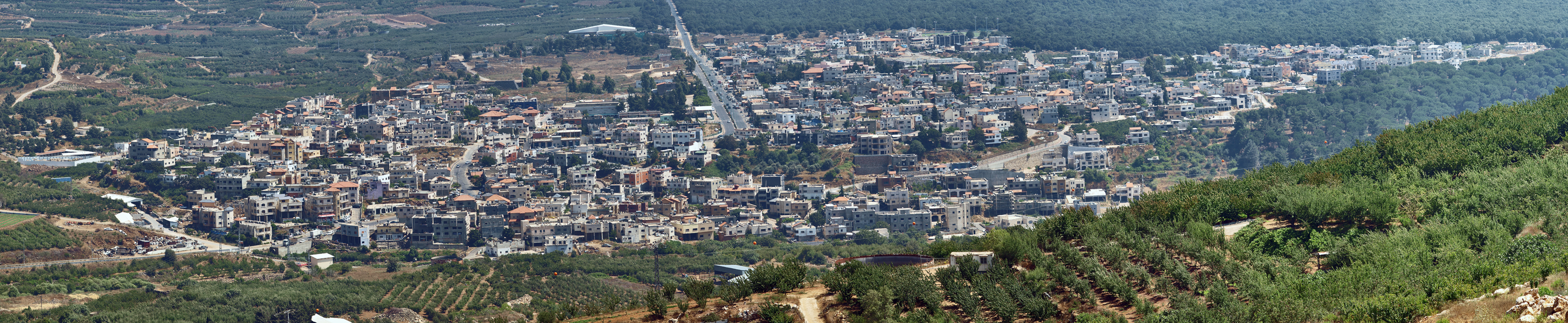 Вид на посёлок Масаада